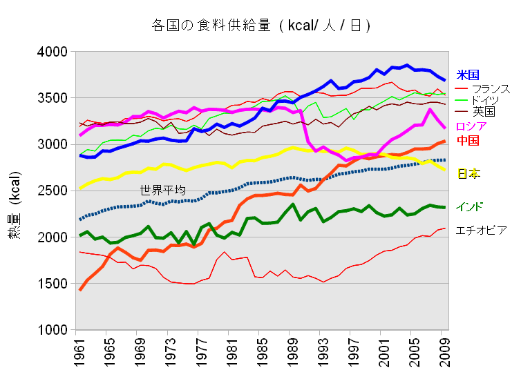 食料供給量（熱量ベース）の推移 - 数値は供給分であり、摂取量は供給量の6-7割ほどである。データ元：国際連合食糧農業機関（FAO） FAOSTAT FAOでは食料の損失および廃棄は、総生産重量の3分の1と推定している。 (FAO-SIK Global food losses and food waste) FAOでは、2700 kcal/人/日を過不足のしきい値としている。(FAO - How the world is fed) 1958-61年の中国の大飢饉（Great Chinese Famine）、1970年代と80年代から90年代にかけてのエチオピア大飢饉（en:1983–1985_famine_in_Ethiopia）、ロシアの1991年以前の数値はソビエト連邦のものである。 参考情報 2010年度の他の地域 FAO: Food Security サブサハラ・アフリカ - 2170 kcal/人/日 北東および北アフリカ - 3120 kcal/人/日 南アジア - 2450 kcal/人/日 東アジア - 3040 kcal/人/日 ラテンアメリカおよびカリブ諸国 - 2950 kcal/人/日 先進国 - 3470 kcal/人/日 new version; 1961-2013